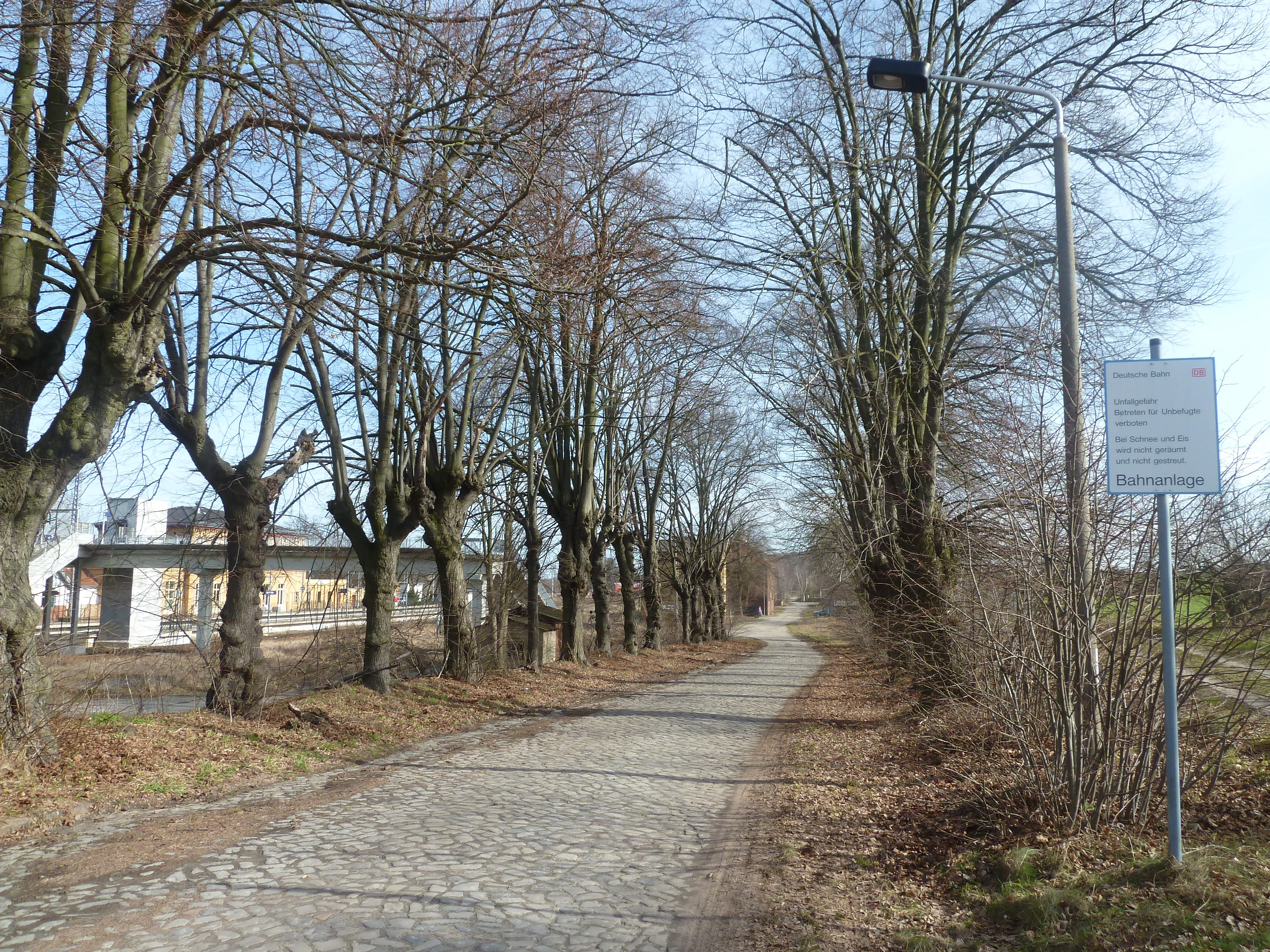 Bf. Bad Belzig, Allee zum Städtebahnhof